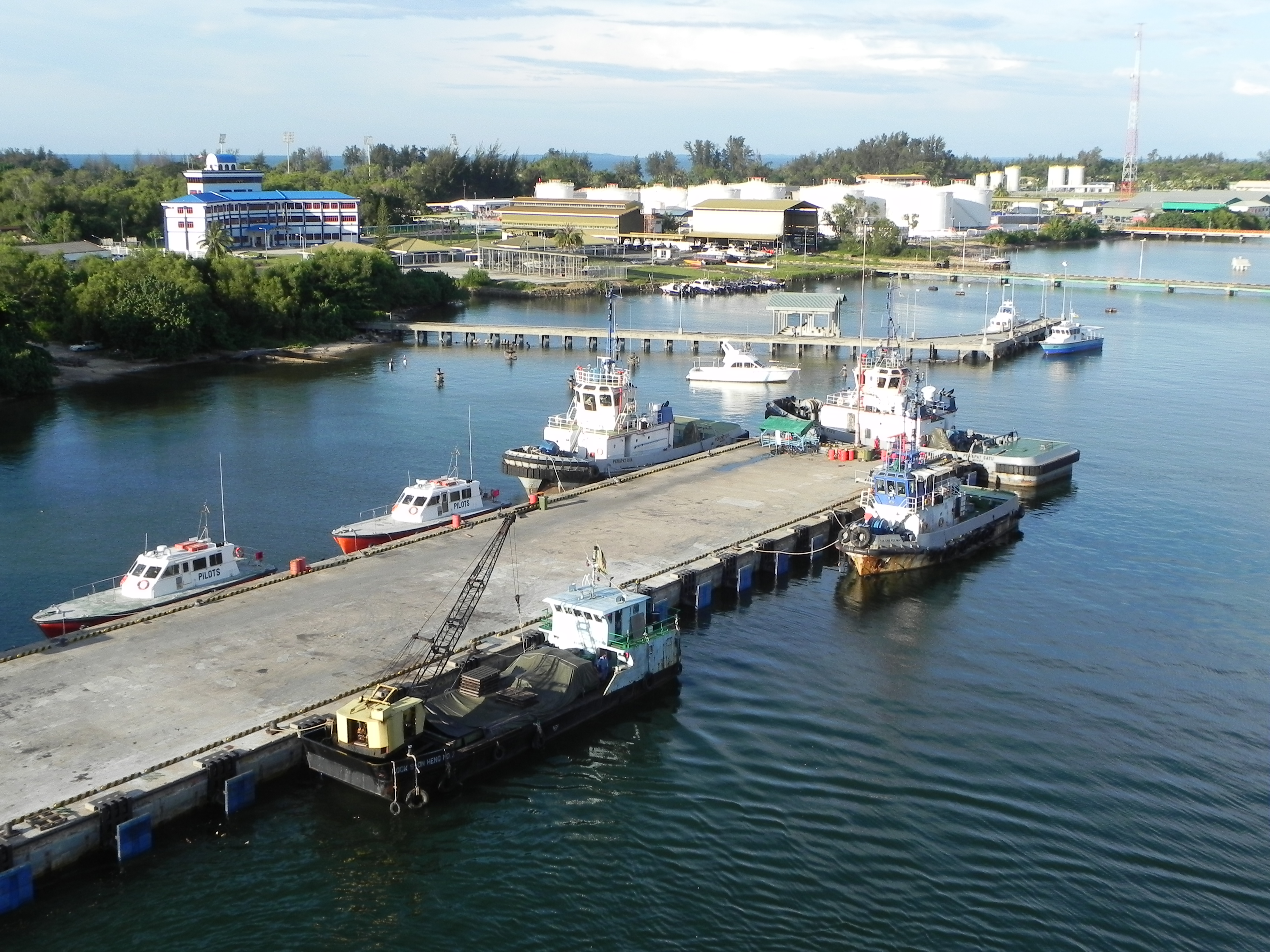 Hafen von Muara (Brunei)